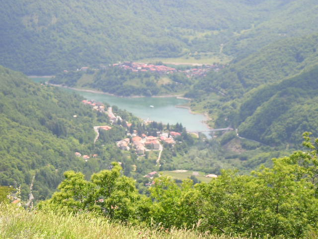 Il paese di Vagli Sotto, Italia